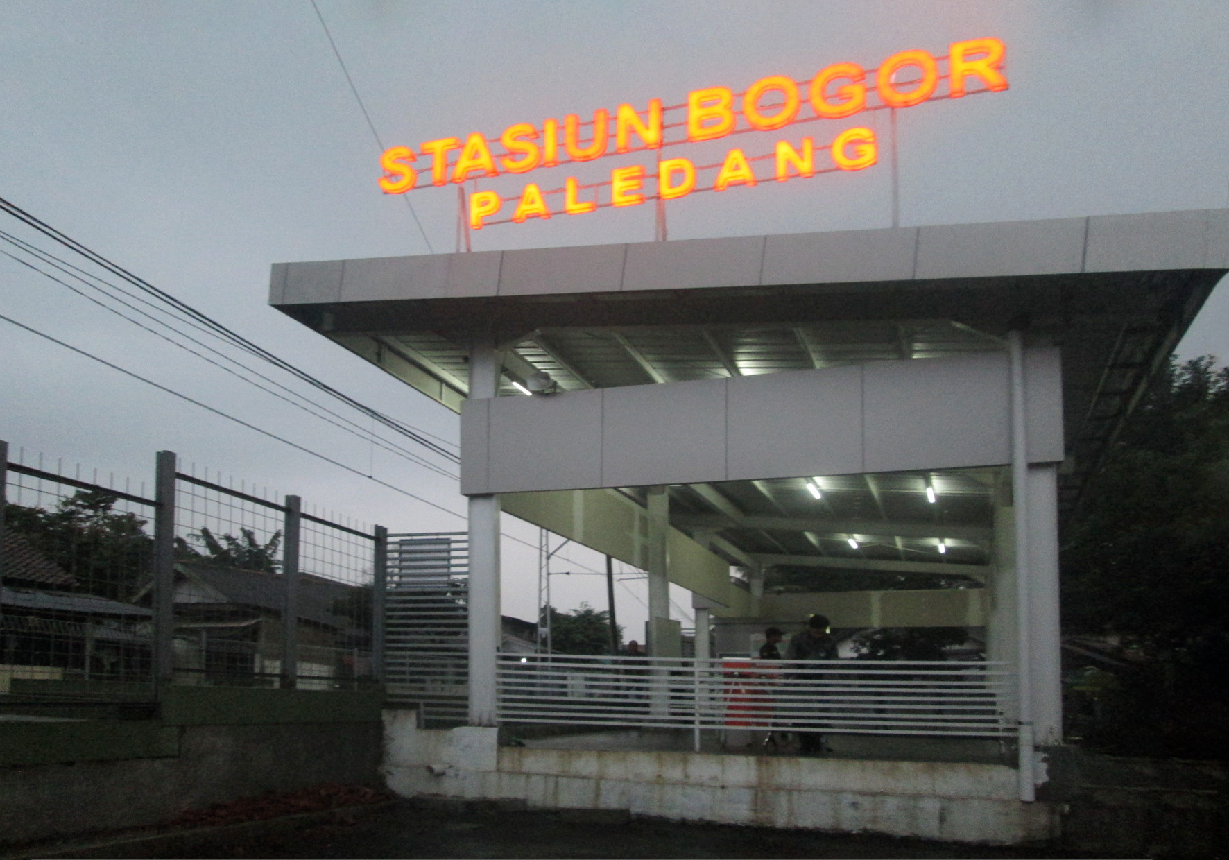 Stasiun Bogor Paledang, Januari 2014.